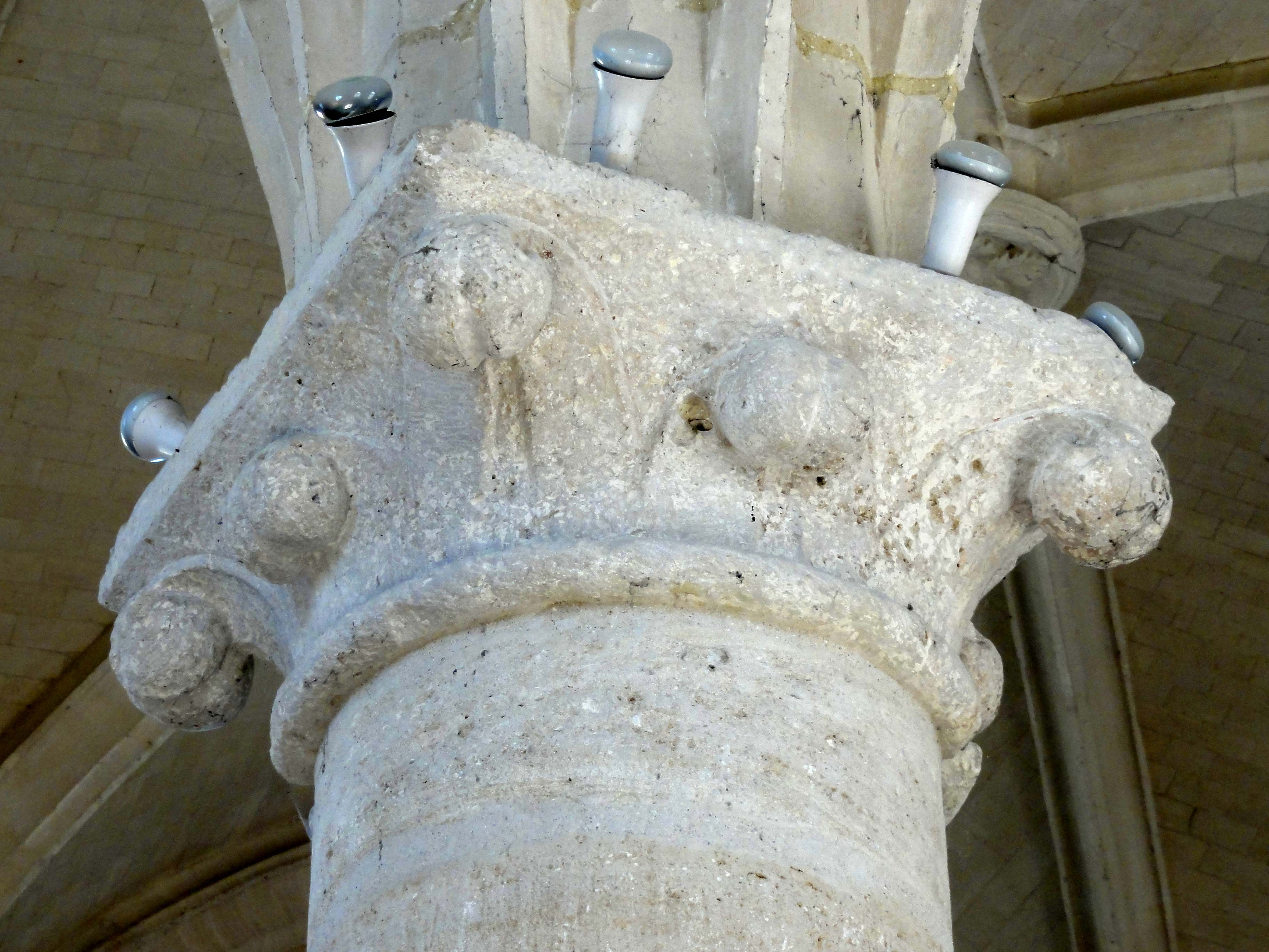 Chapiteau(x) - voir titre.